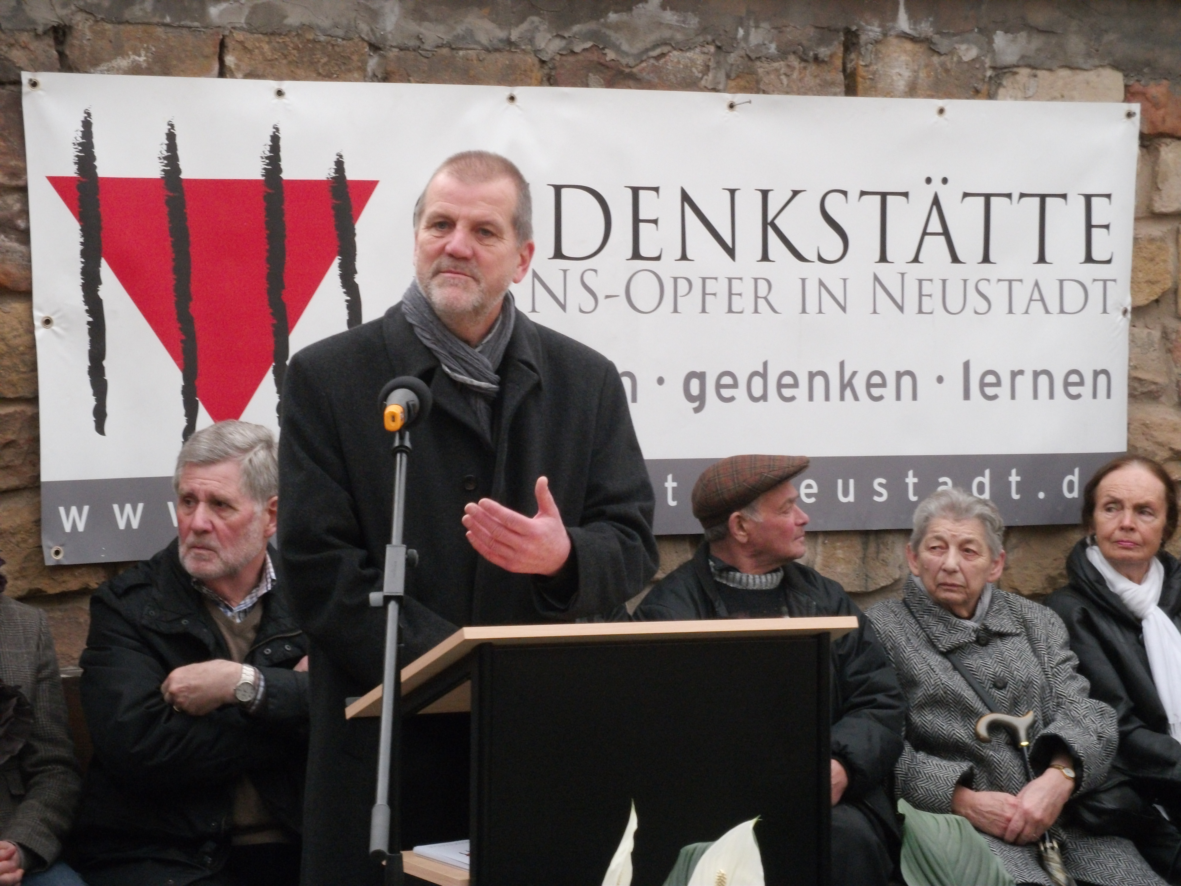 NS-Gedenkstätte Neustadt (Weinstr.), der rheinland-pfälzische Justizminister Jochen Hartloff bei der Eröffnung